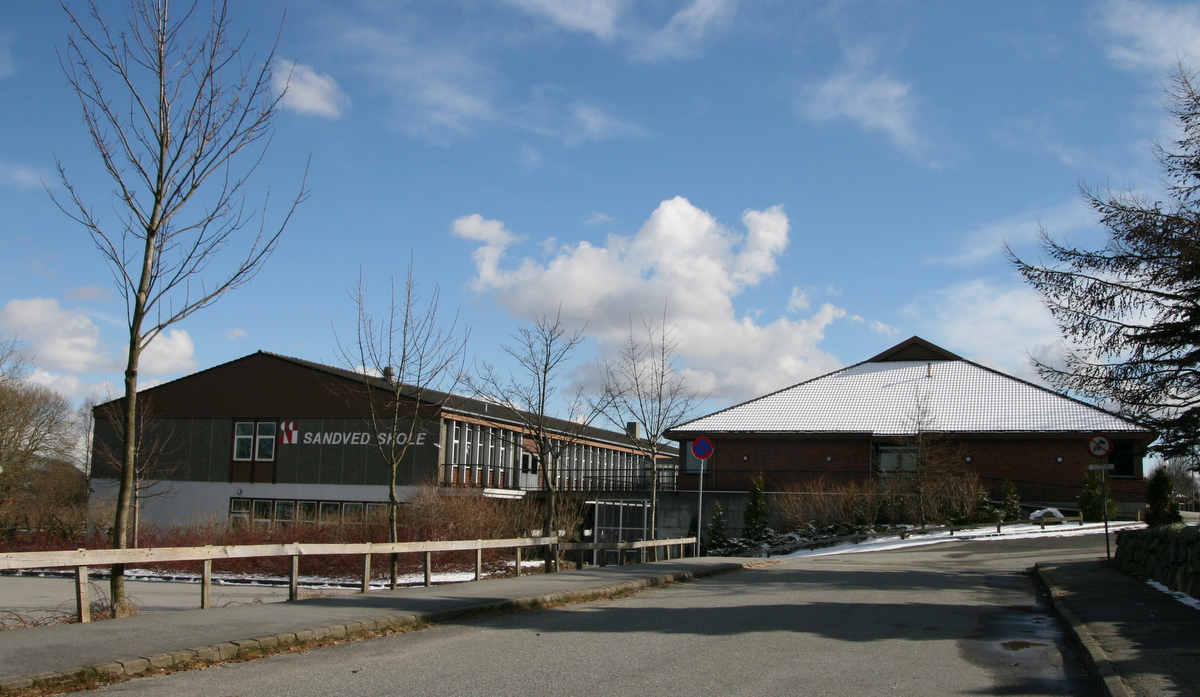 Sandved skole